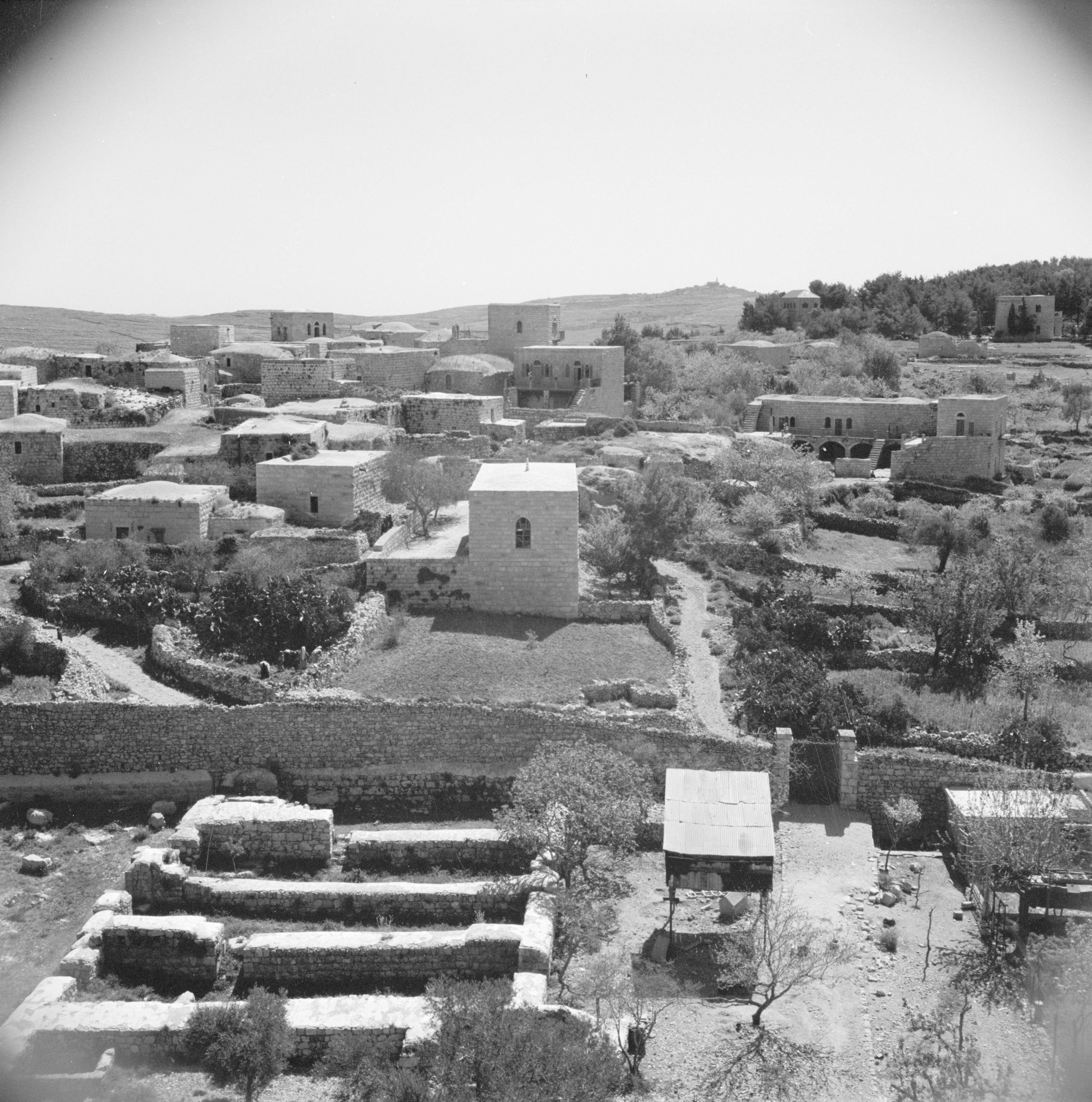 Collectie / Archief : Fotocollectie Van de Poll Reportage / Serie : Midden-Oosten 1950-1955: Jordanië Beschrijving : Zicht op Emmaus Annotatie : Ten tijde van de opname lag deze plaats in Jordanië Datum : 1950 Locatie : Emmaus, Palestine, Jordanië Trefwoorden : dorpen, panorama Fotograaf : Poll, Willem van de Auteursrechthebbende : Nationaal Archief Materiaalsoort : Negatief (zwart/wit) Nummer archiefinventaris : bekijk toegang 2.24.14.02 Bestanddeelnummer : 255-5529